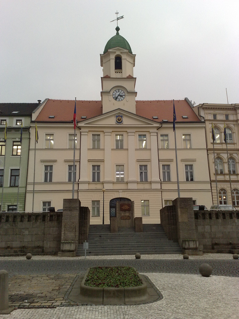 Teplická radnice / Townhall